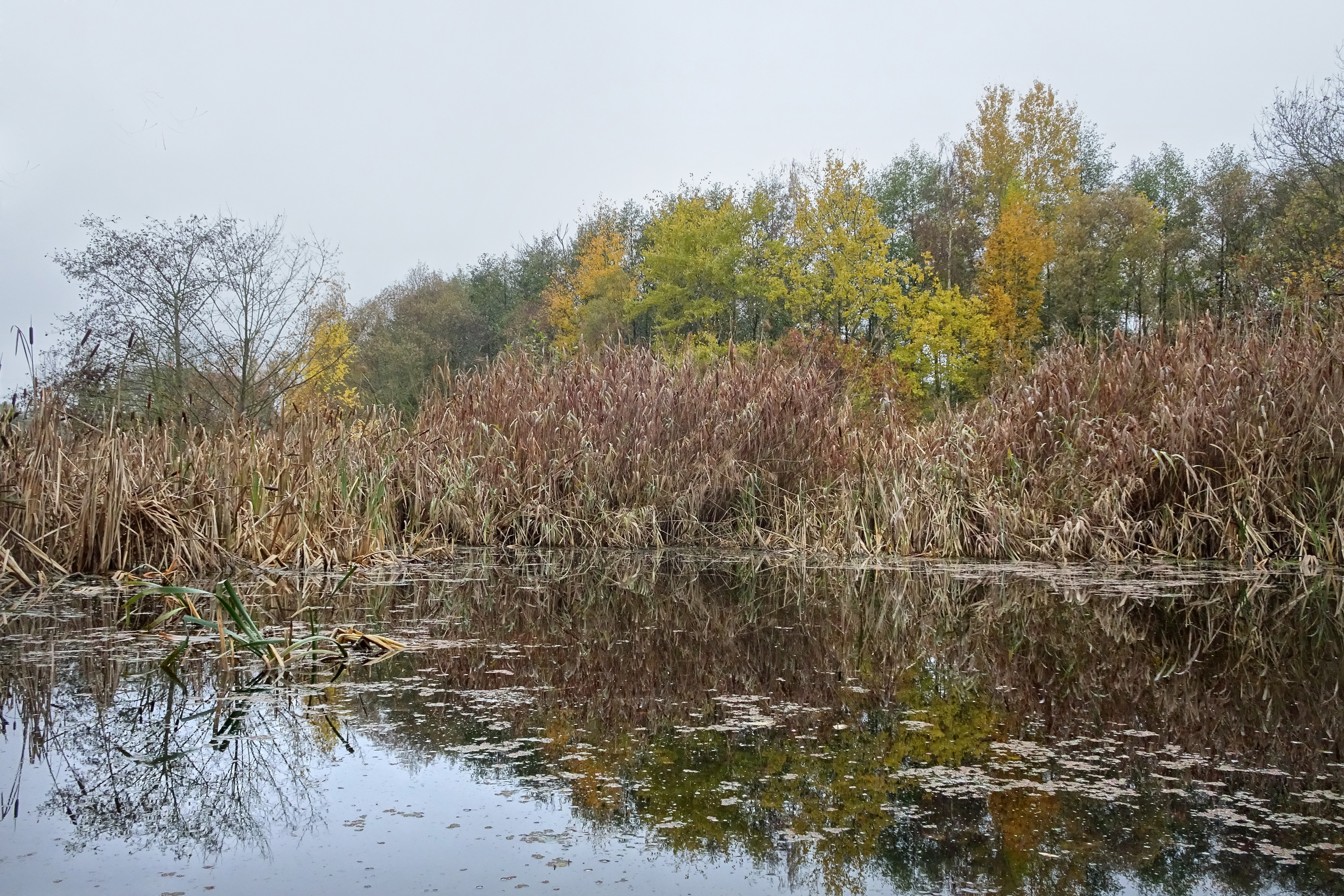 Die „Ulfewiesen bei Weiterode“ sind ein feuchtes Auengebiet im hessischen Landkreis Hersfeld-Rotenburg, zwischen dem Bebraer Stadtteil Weiterode und der Gemeinde Ronshausen. Durch den Wiesengrund fließt die namengebende Ulfe, die nahe der Landesgrenze zu Thüringen aus dem Zusammenfluss zweier Quellbäche entsteht. Der ehemals begradigte Bach wurde in Zusammenarbeit von ehren- und hauptamtlichem Naturschutz in den letzten Jahrzehnten naturnah umgestaltet. Die Renaturierungsarbeiten hatten zum Ziel, durch die Verlegung des Baches neue auentypische Lebensräume vorzubereiten. Die Ulfe mündet, wenige Kilometer von den Ulfewiesen entfernt, als rechter Zufluss in die Fulda. Um die Eigenentwicklung des Bachlaufs der Ulfe mit ihren Zuflüssen zu fördern und die angrenzenden Auenbereiche als Lebensraum der hier vorkommenden seltenen Pflanzen- und Tierarten zu sichern, wurden die Ulfewiesen im Dezember 1995 zum Naturschutzgebiet erklärt.